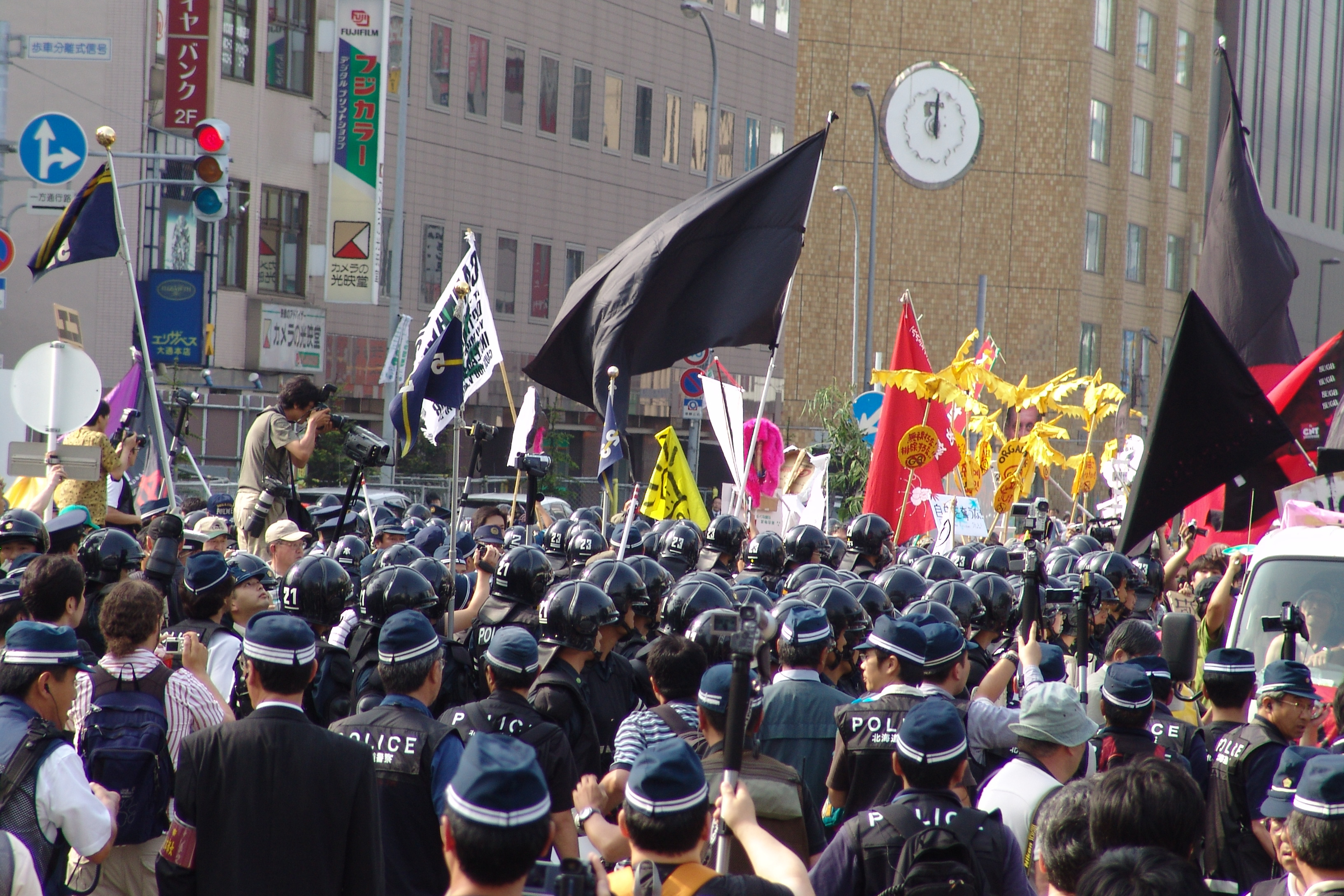 2008 G8 Summit: Antiglobalist Demonstration March.